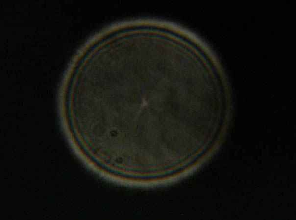 Fekete négyzetben szürkésbarna tárcsa, a közepén egy világosabb pont.